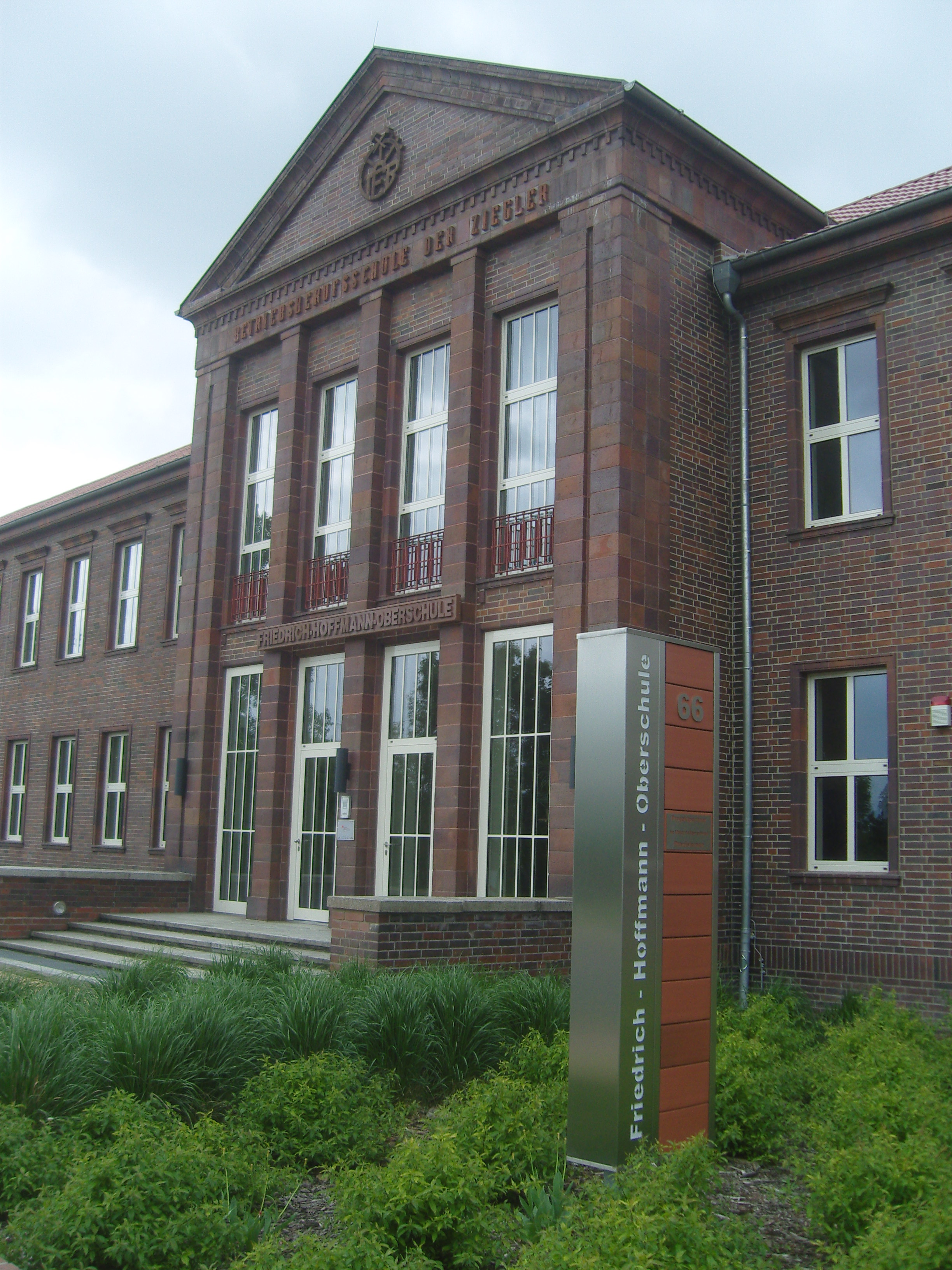 ehemalige Betriebsberufsschule der Ziegler in Großräschen heute Friedrich-Hoffmann-Oberschule in Großräschen